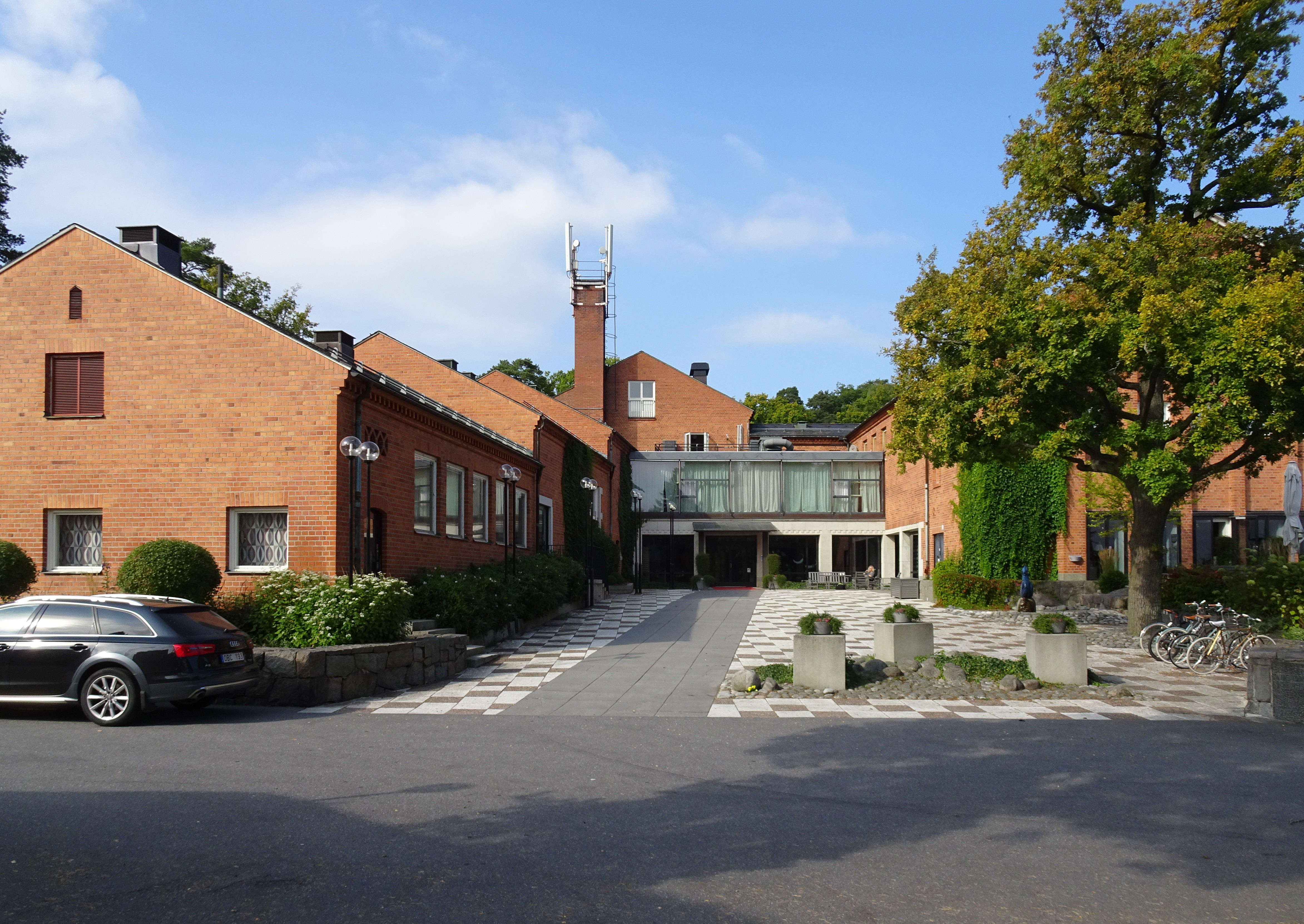 Vår Gård, konferensanläggning, entré